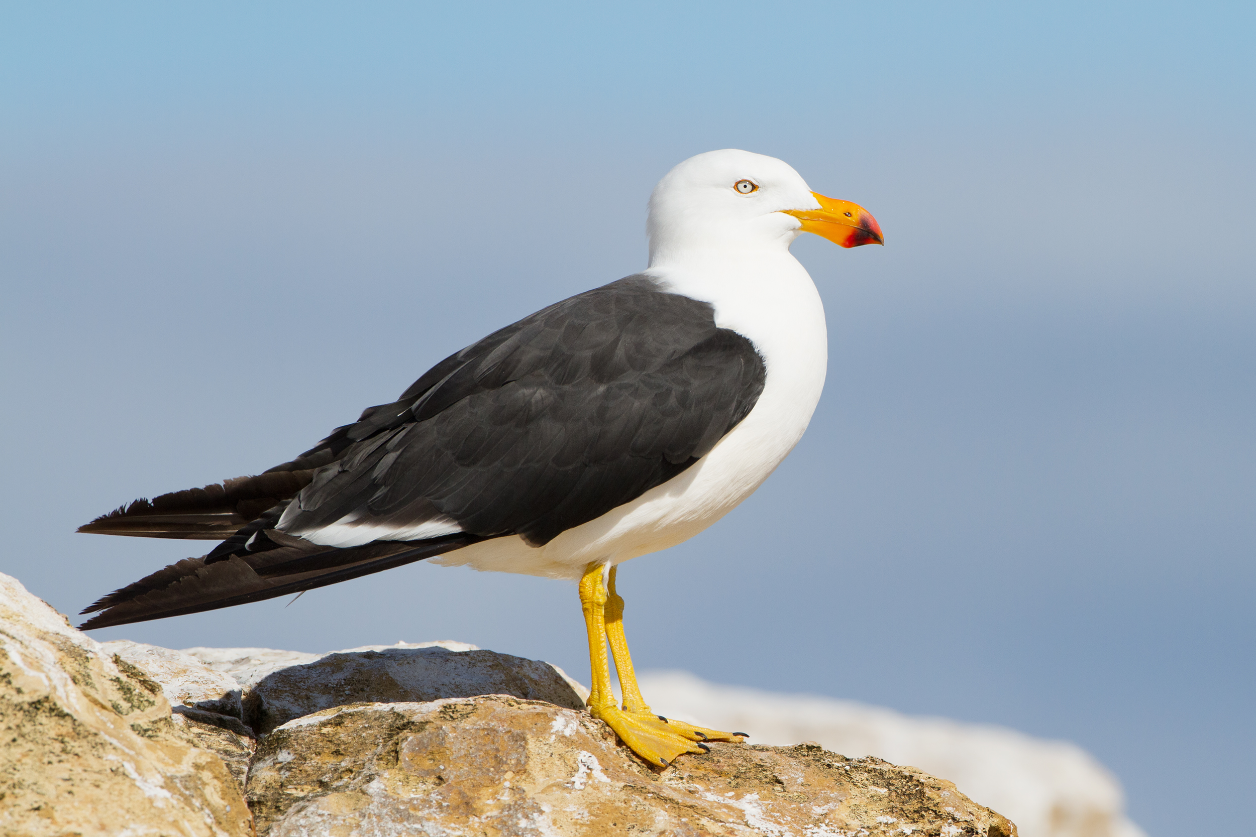 Pacific Gull (Larus pacificus), Derwent River Estuary, Tasmania, Australia